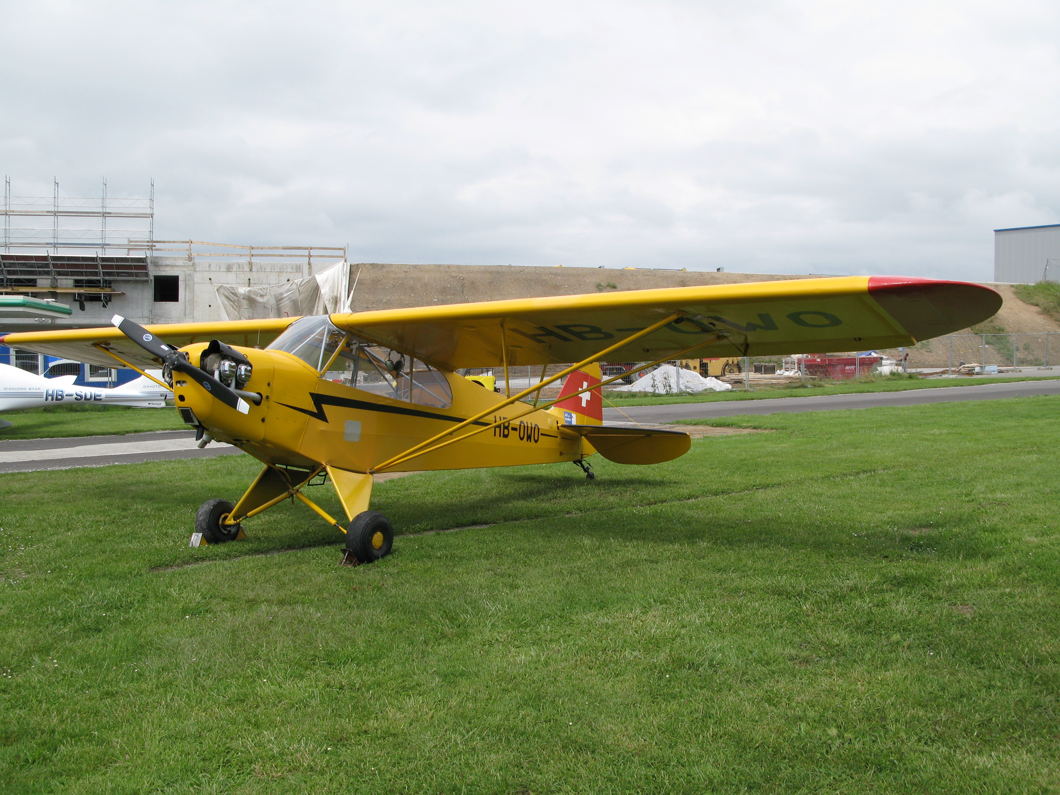 Piper J-3C-65 Cub